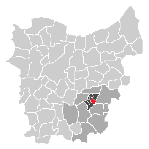 Oost-Vlaanderen uitgeknipt en bewerkt